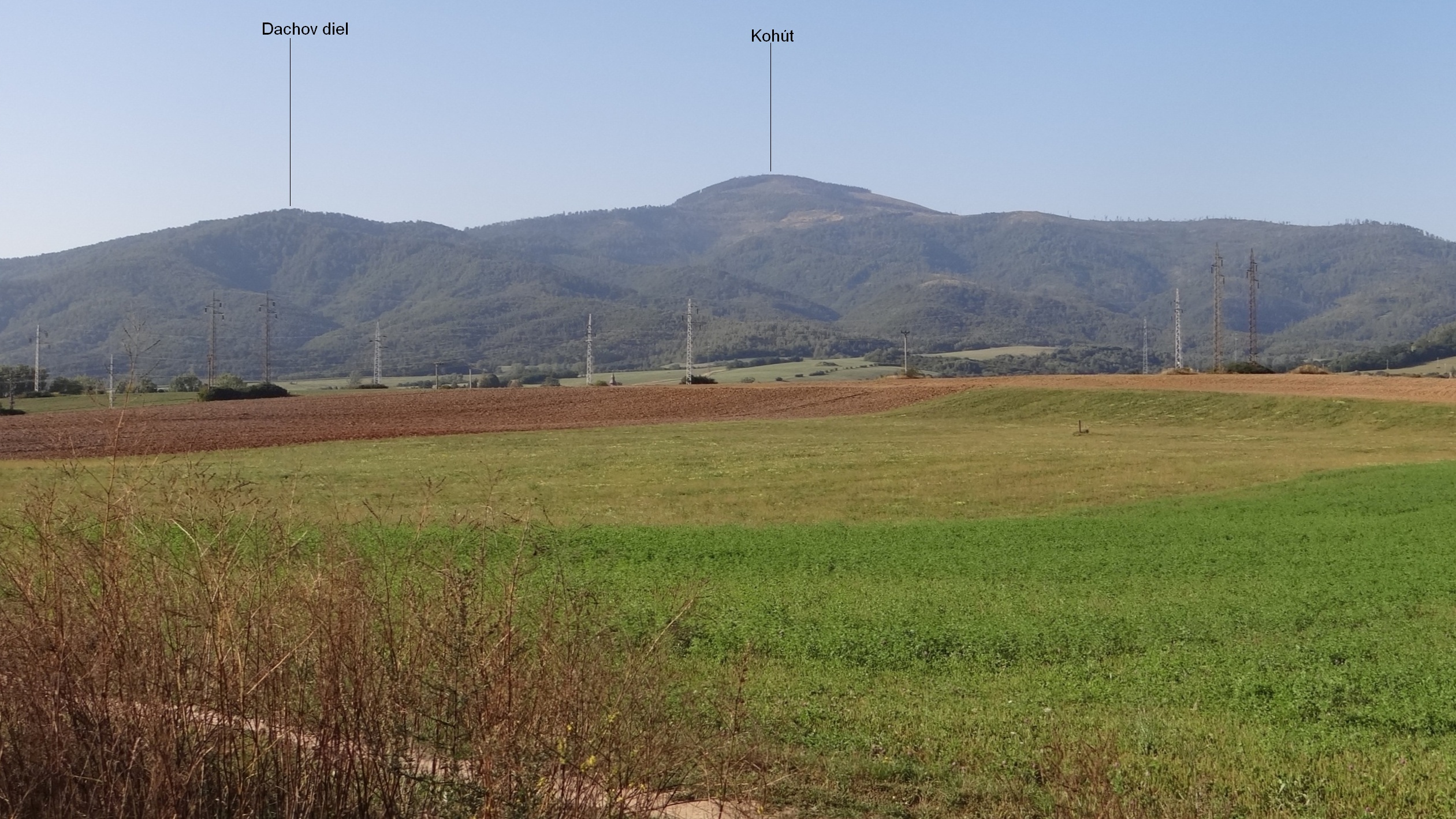 Kohút i Dachov diel